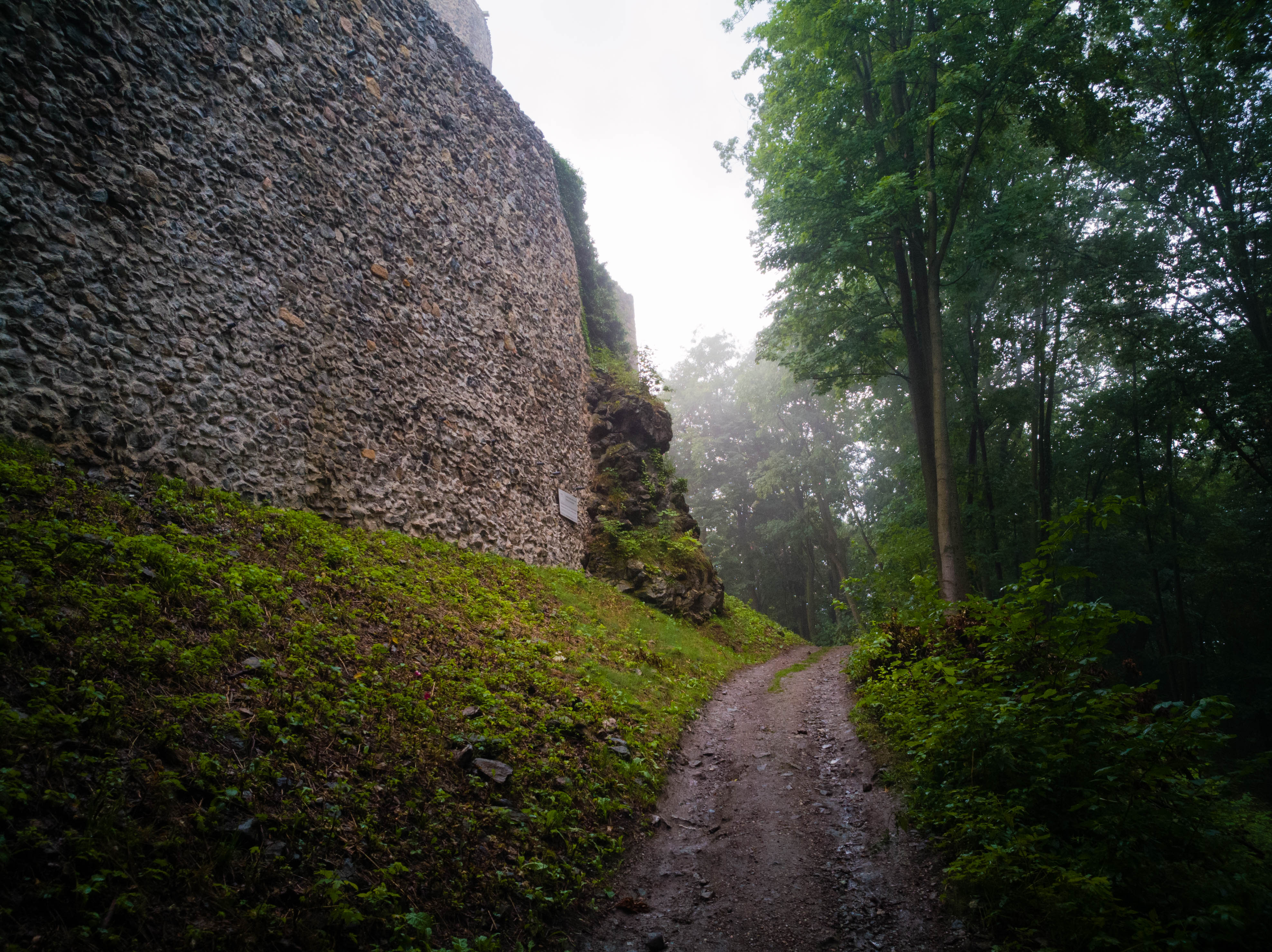 Łupki, Zamek Wleń Wikidata has entry Q8716748 with data related to this item.